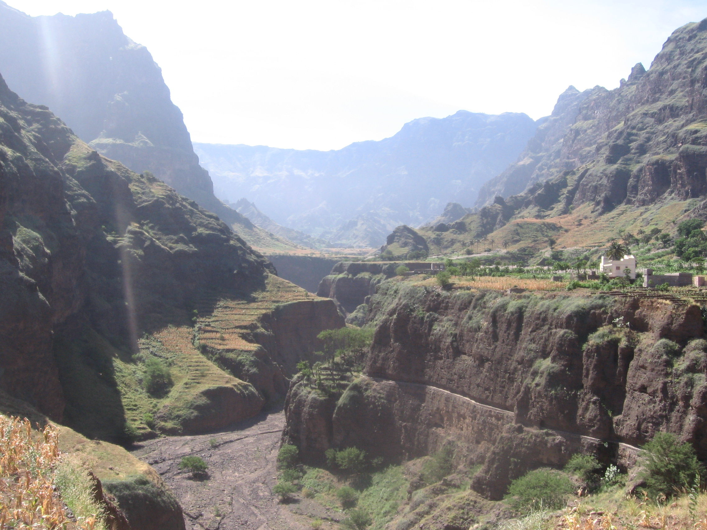 Canhão da ribeira da Garça, Santo Antão, Cabo Verde